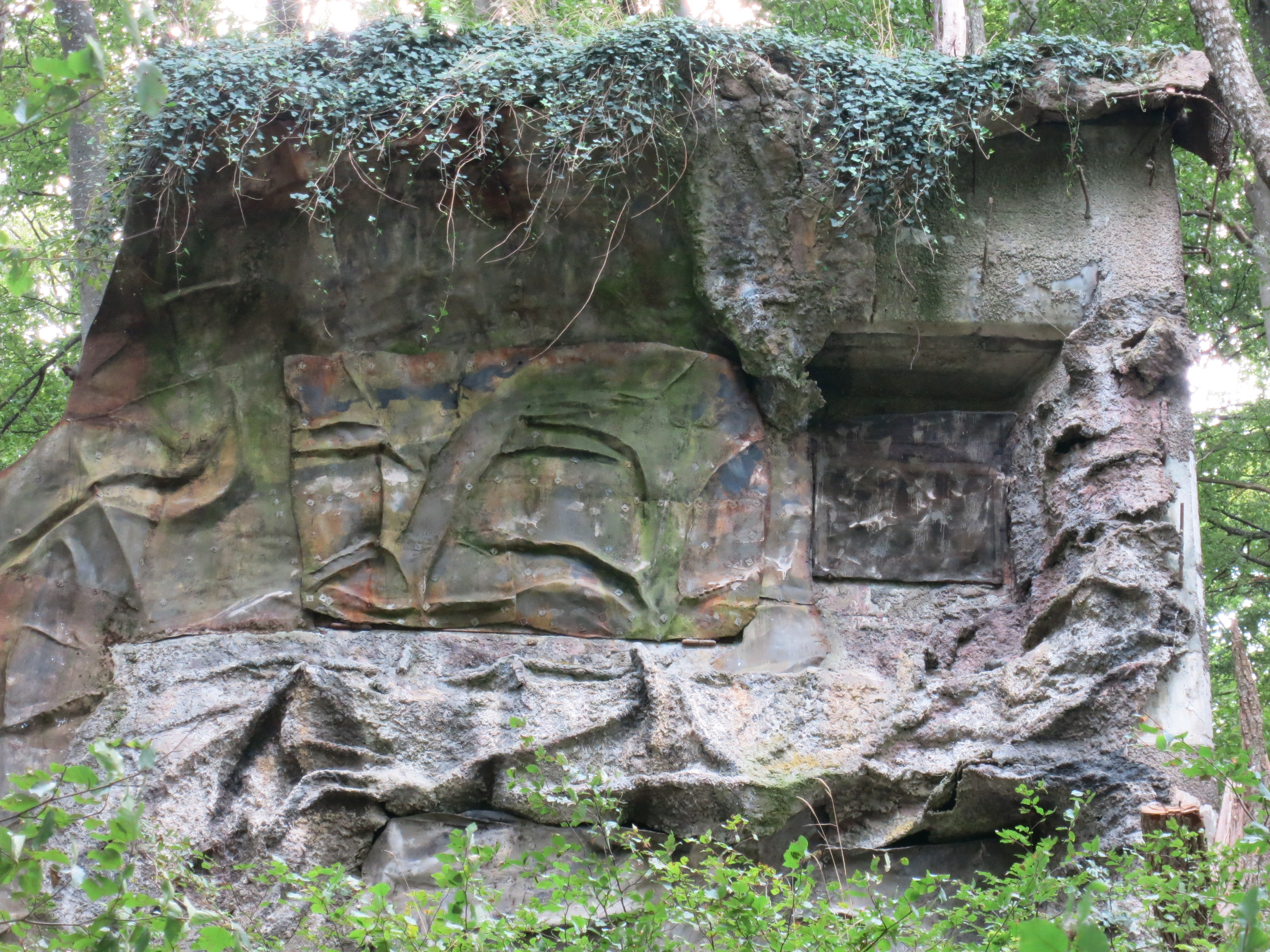 Sperrstelle Challhöchi, Hauenstein-Ifenthal SO, Schweiz